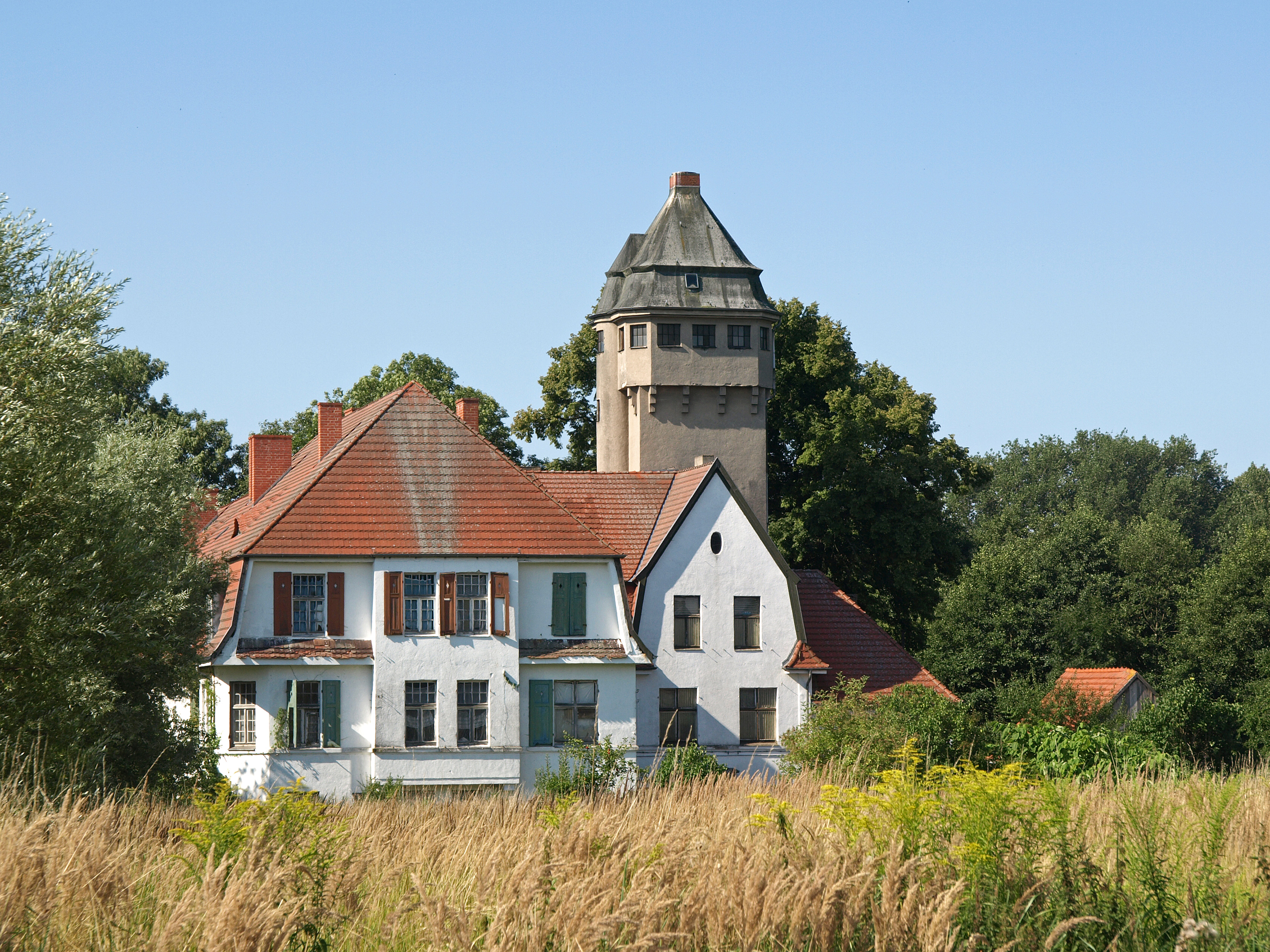 Gutshaus in Zehna